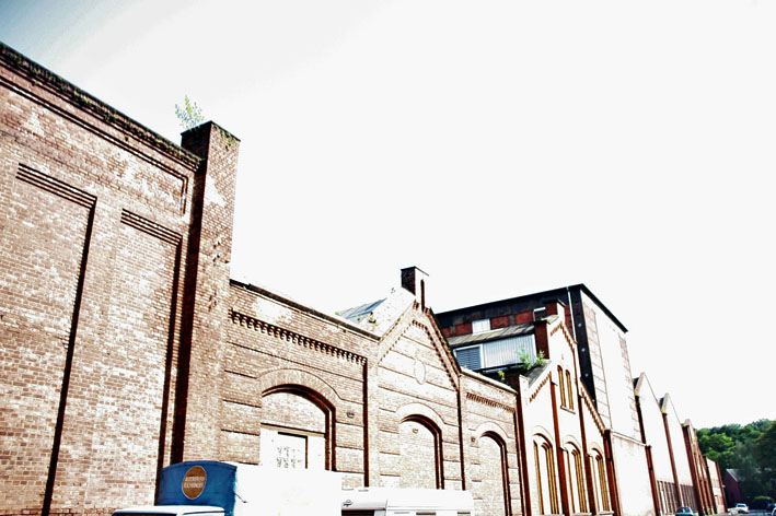 Westseite des Henschel-Werks Rothenditmold (Hammerschmiede) in Kassel